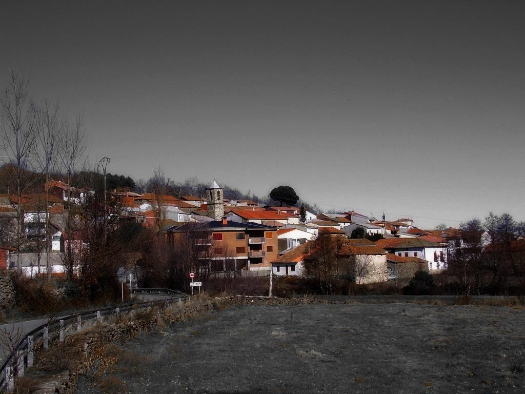 fotomontaje.